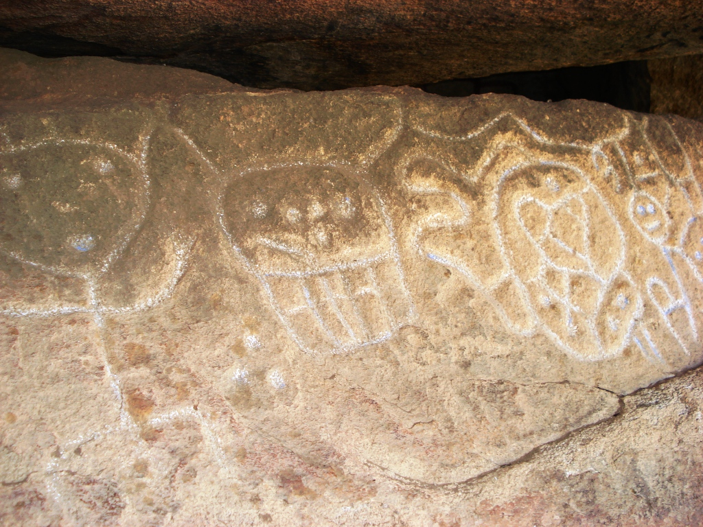 Elemento Nº 1 de la zona arqueológica de Palma Sola en Acapulco, Guerrero, México.